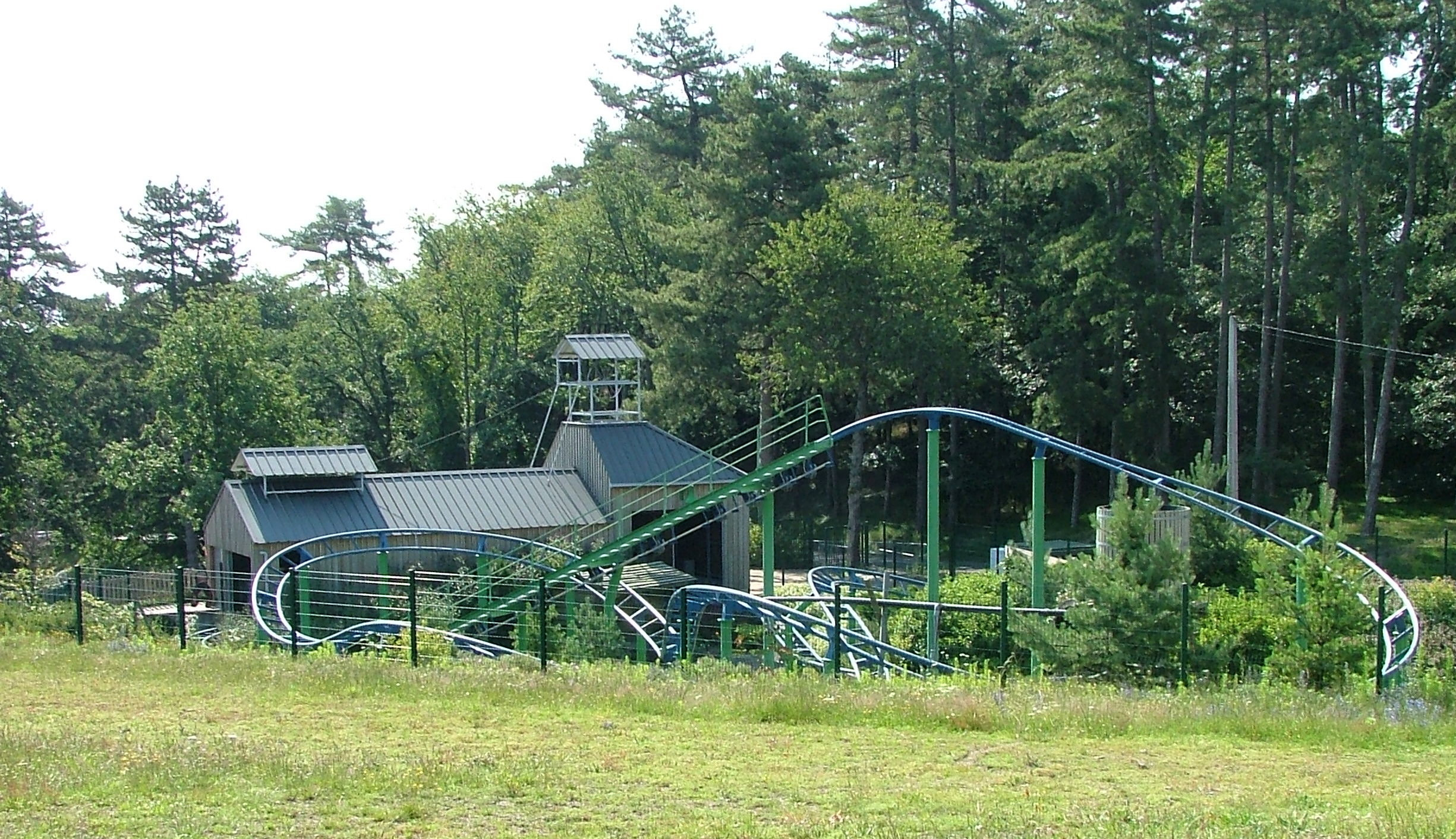 Parc des Combes, Le Creusot, France